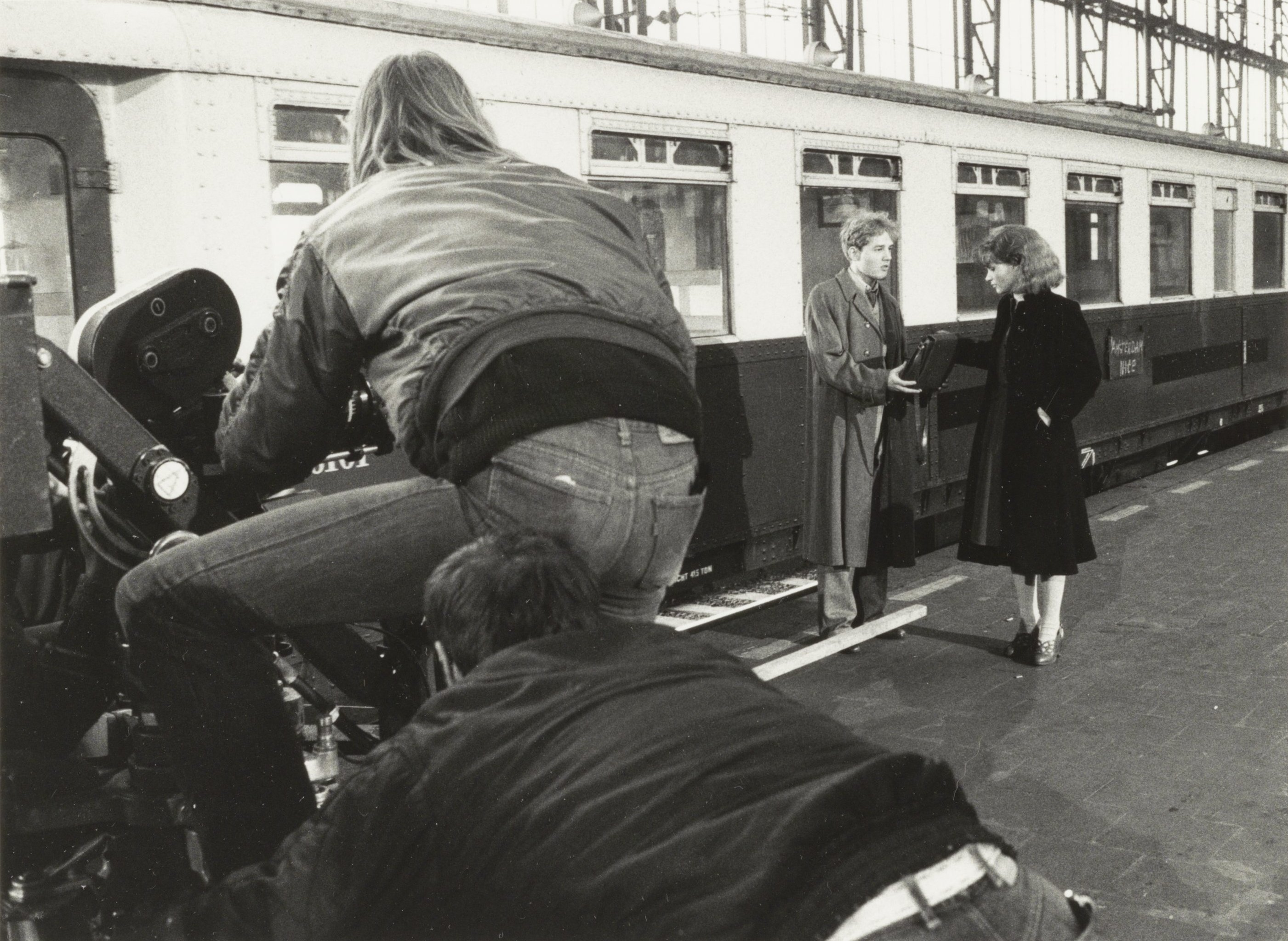 Filmopname op het perron van station Haarlem voor de film "Het meisje met het rode haar", met de actrice Renée Soutendijk als Hannie Schaft.